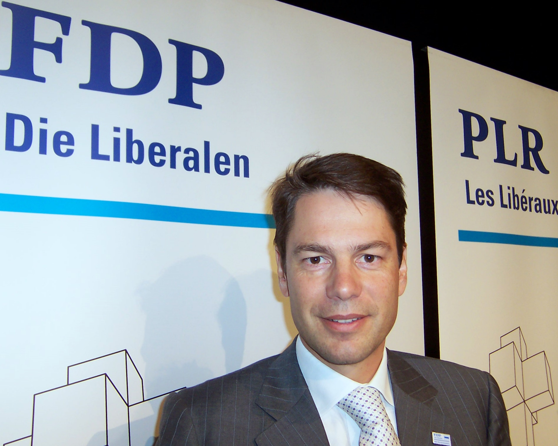 Stefan Brupbacher, Generalsekretär der Schweizer Partei FDP. Die Liberalen